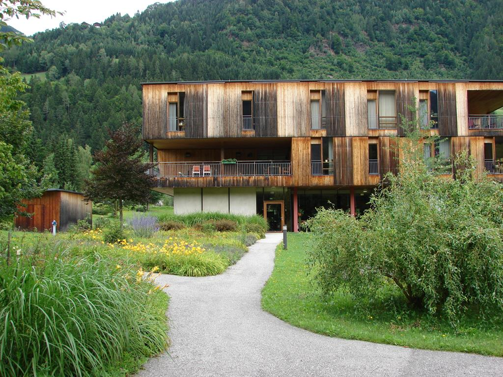 Altenwohn- und Pflegeheim Steinfeld in Steinfeld im Drautal